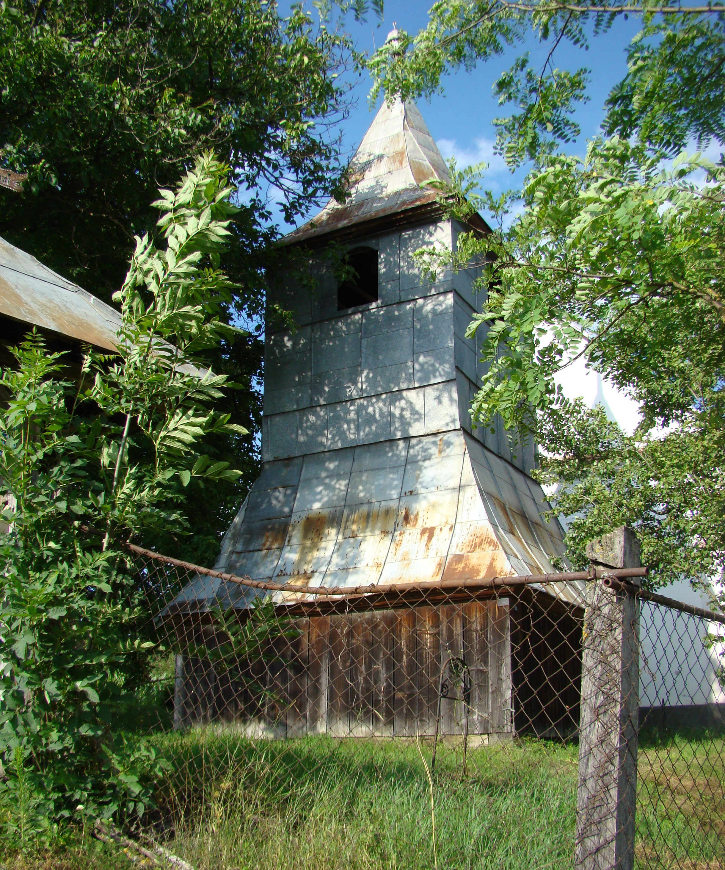 Turn clopotniță din lemn al bisericii reformate din satul Fântânița; comuna Miceștii de Câmpie, județul Bistrița-Năsăud 02